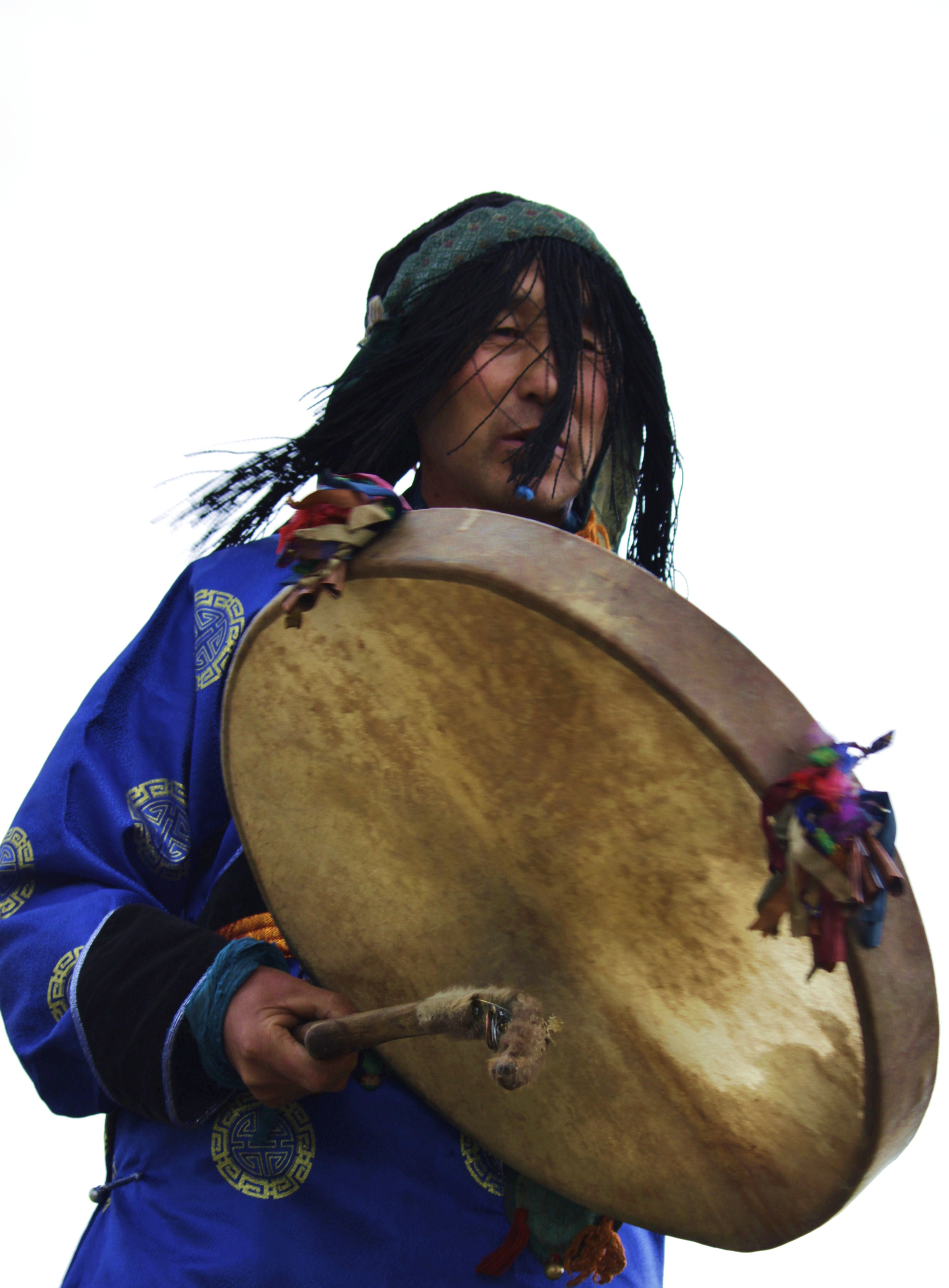 Еравнинский шаман Сандан во время обряда на горе Тологой. Бурятия.